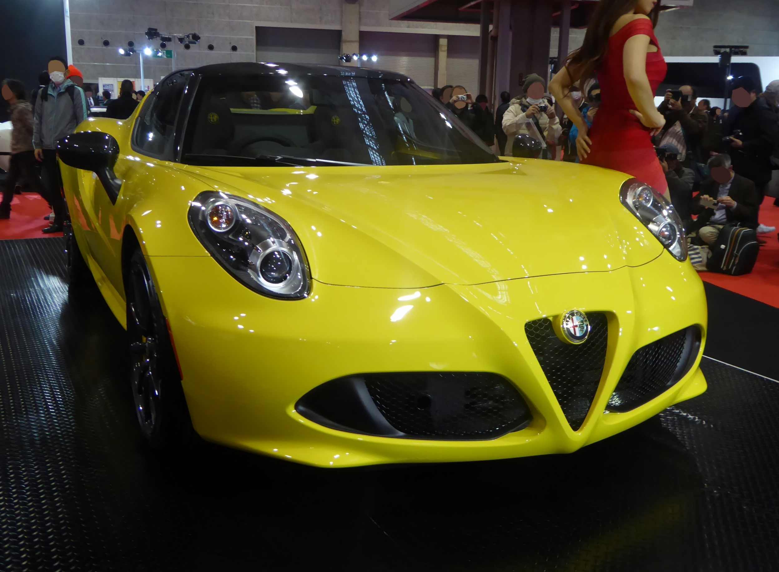 大阪モーターショー2015においてアルファロメオ・4Cスパイダーを撮影。